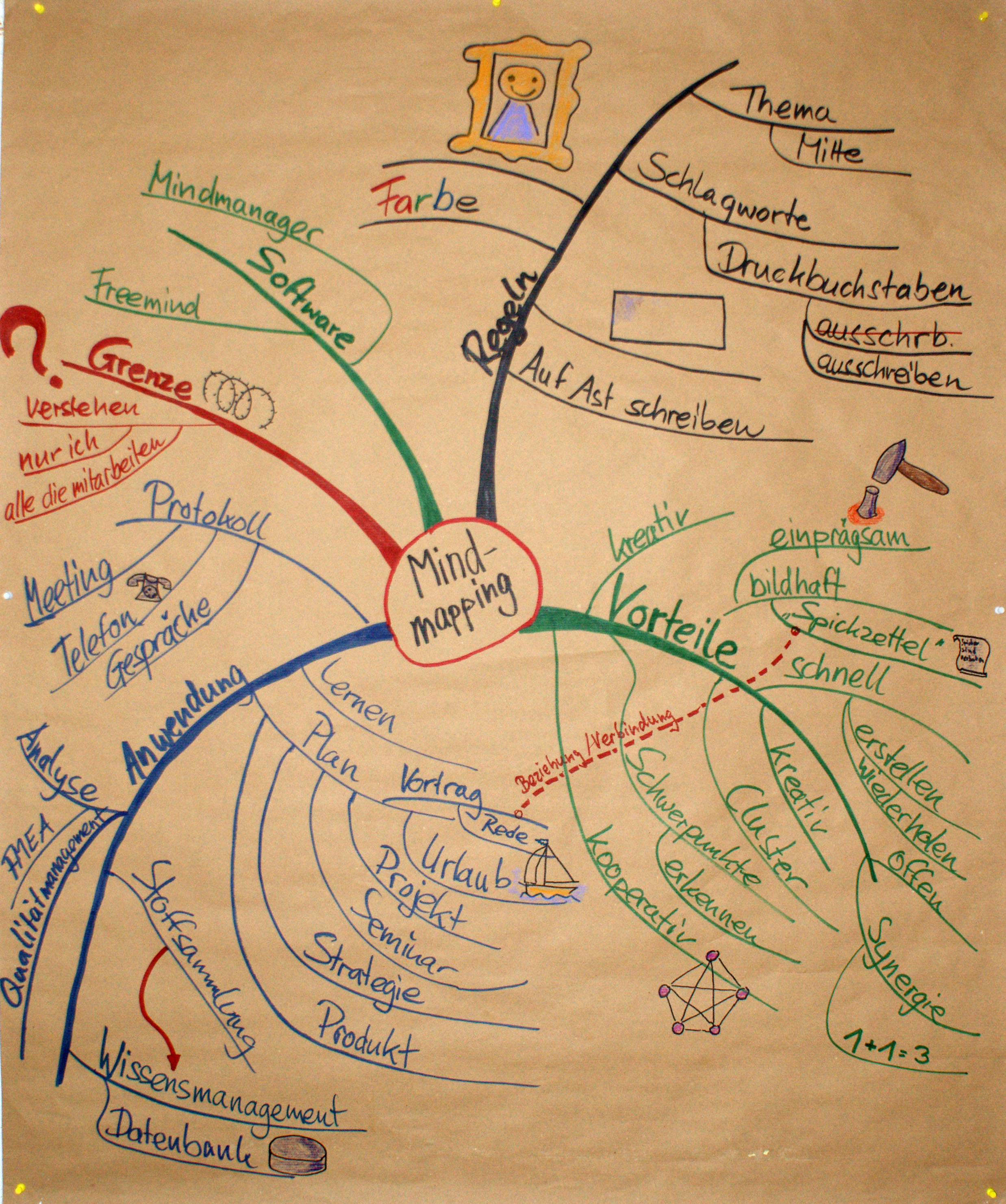 Pinwandmoderation: Mindmap zum Thema Mindmap